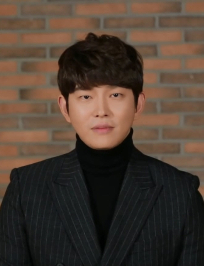 (예고) CNTV 역적 - 윤균상, 채수빈